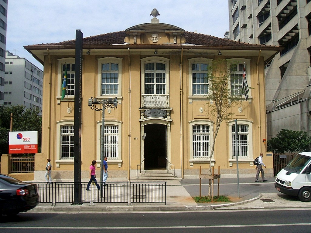 Instituto Pasteur, na Avenida Paulista (São Paulo, Brasil)